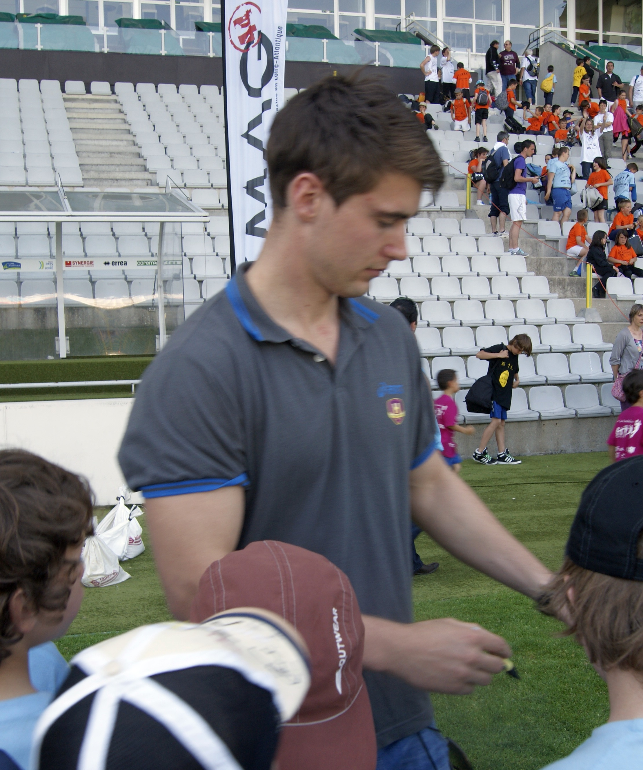 Johannes Hippe, ici au stade de la Beaujoire de Nantais signant des autographes aux Jeunes Handballeurs Nantais.